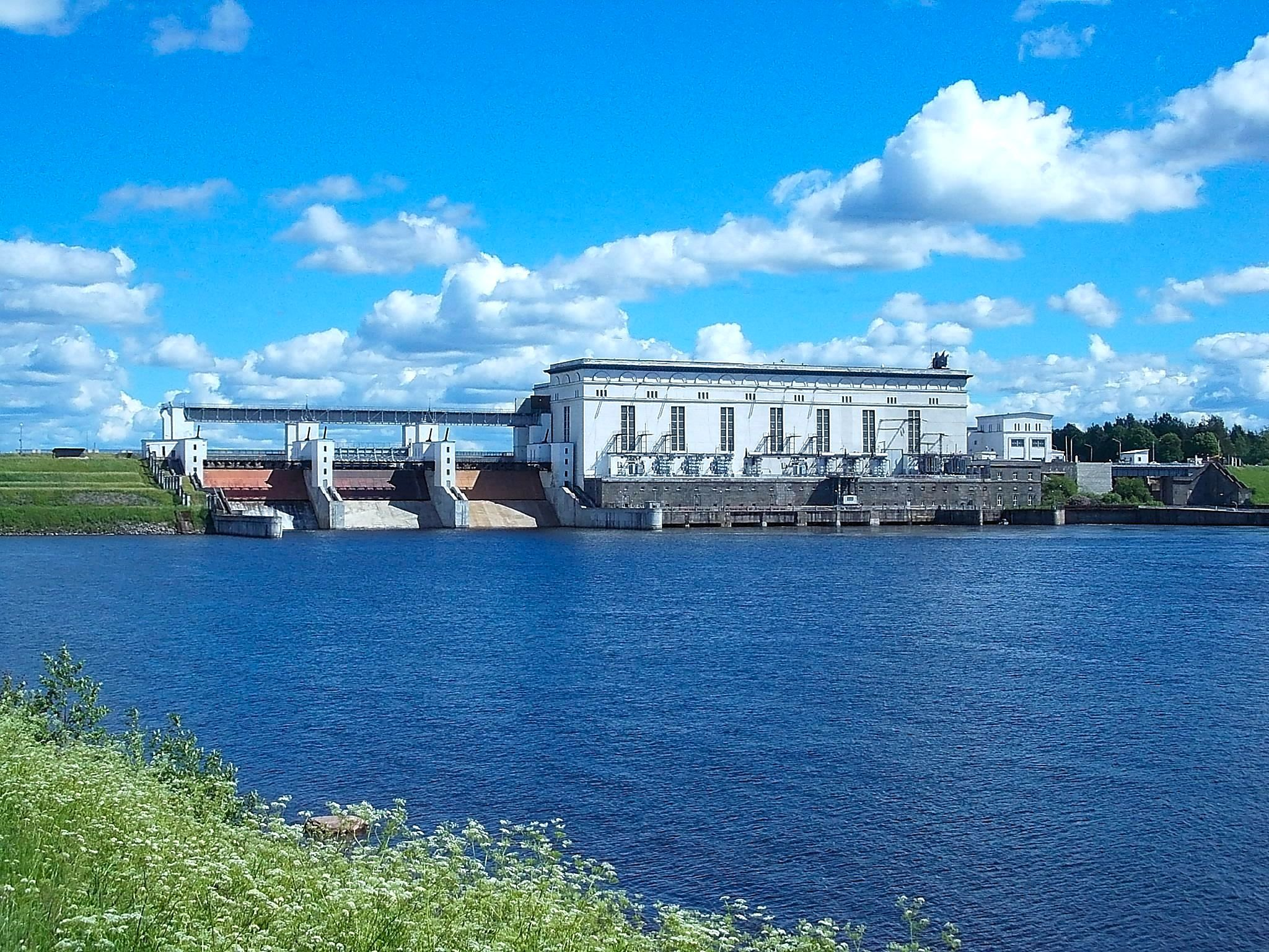 Верхнесвирская ГЭС